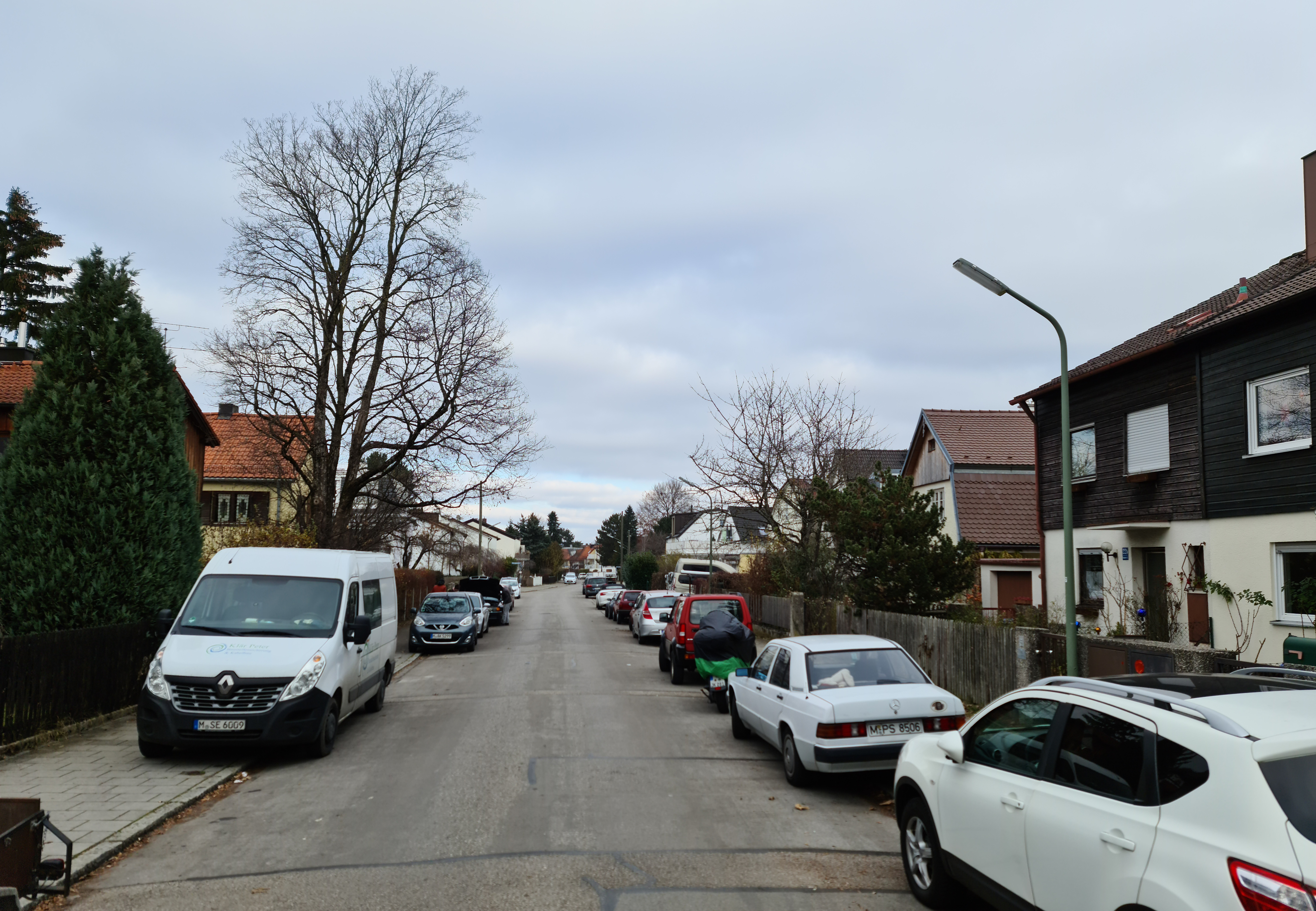 München-Kleinhadern, Ansicht von SSW nach NNO in die Kleinhaderner Straße, die bis in die 20er Jahre des 20. Jahrhundert die Verbindungsstrasse von Kleinhadern nach Laim bildete.